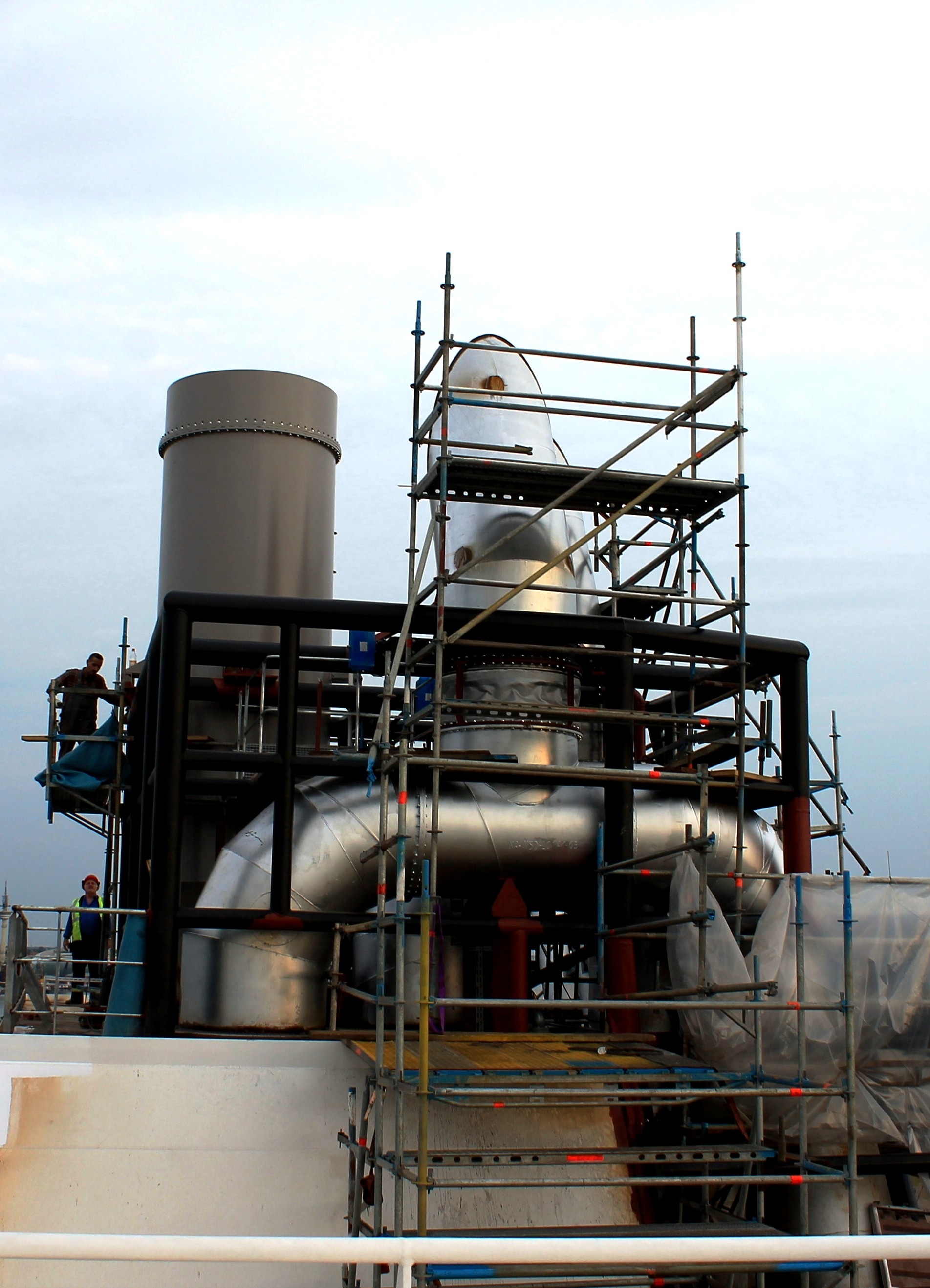 Einbau der Entschwefelungsanlage auf der Timca